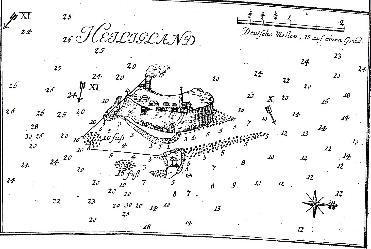 Karte von Helgoland 1757. Ausschnitt aus Stich der Nordseemündung.